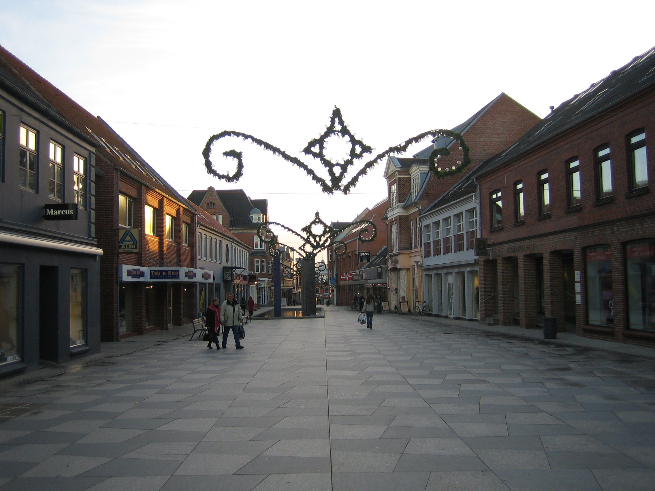 Strøget i Holstebro. Vue mod syd ad Nørregade ved Nørreport Centret og Svane Apoteket. Et stykke nede af gågaden ses "Vandkunsten" (af Helge Bertram) - en af de mange skulpturer i byen.